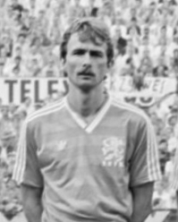 Nederland tegen Hongarije 2-0; het Nederlandse elftal vln (staand) Hiele, Van Tiggelen, Koeman, Rijkaard, Gullit, zittend vlnr A. MÃ¼hren, Wouters, Vanenburg